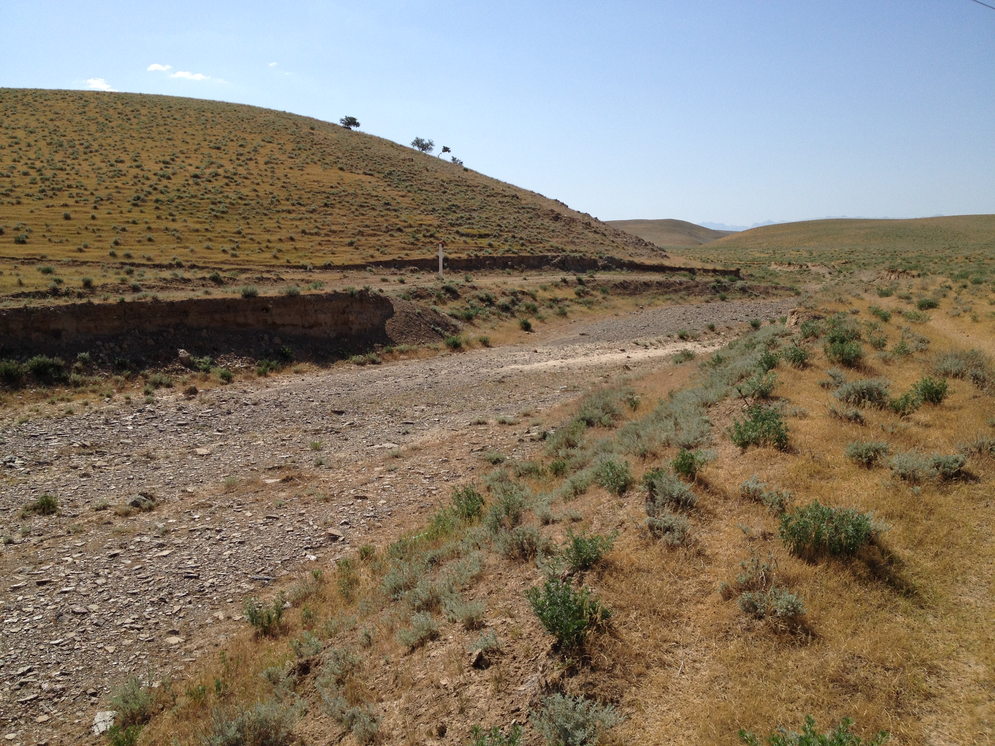 Сухое русло Джингилсай в Кызылкуме, Нуратинский район